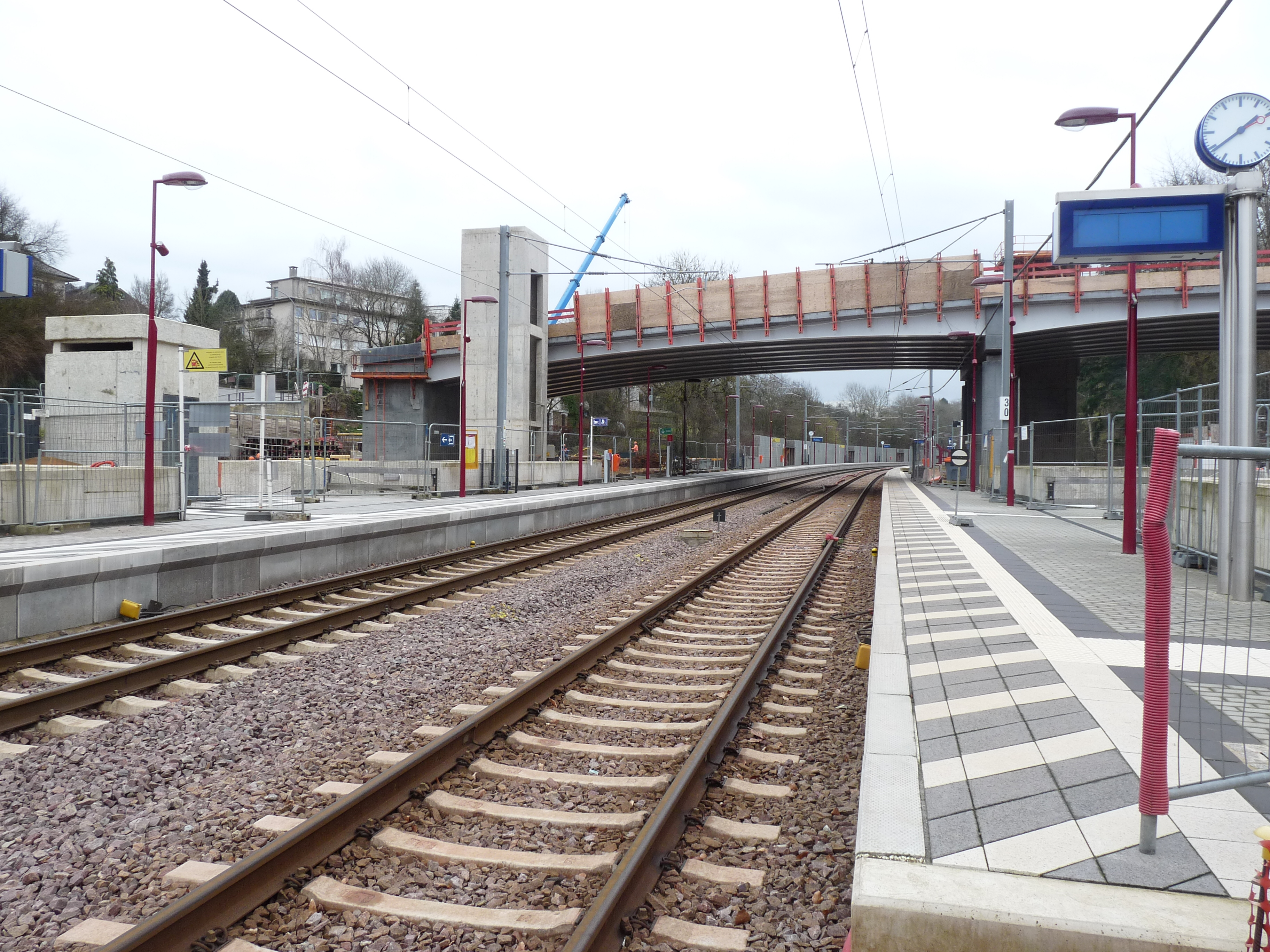 Bouwwerkzaamheden voor het dubbelsporig maken van Luxemburg stad tot Sandweiler. Het station is al dubbelsporig maar tijdelijk wordt enkelsporig gereden.